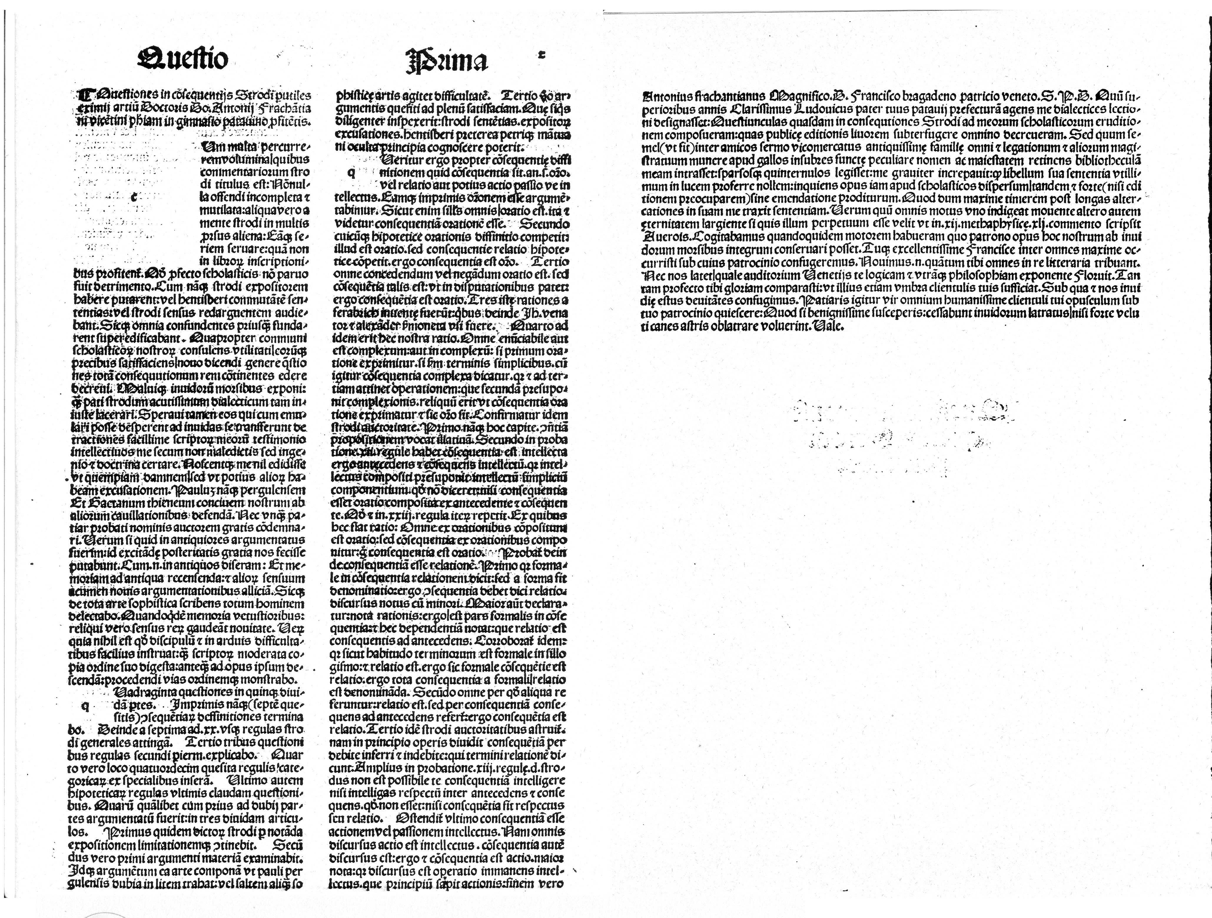 Frontespizio Antonio Fracanzani, Questiones in consequentiis Strodi, Venezia, 1494, con dedica a Francesco Bragadin (lato dx)